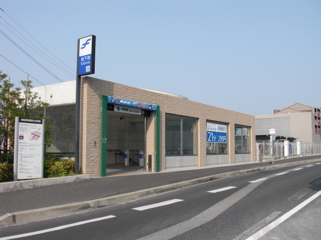 Kamo Station in Japan Fukuoka